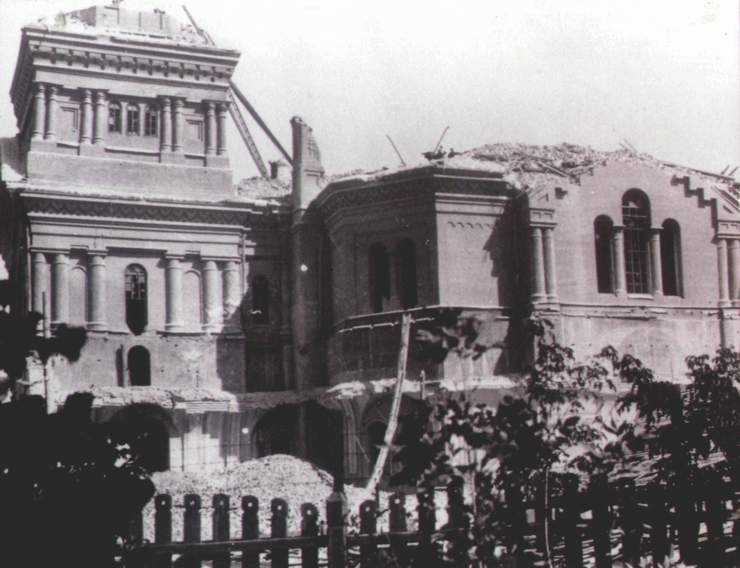 Разрушенный кафедральный собор Самары